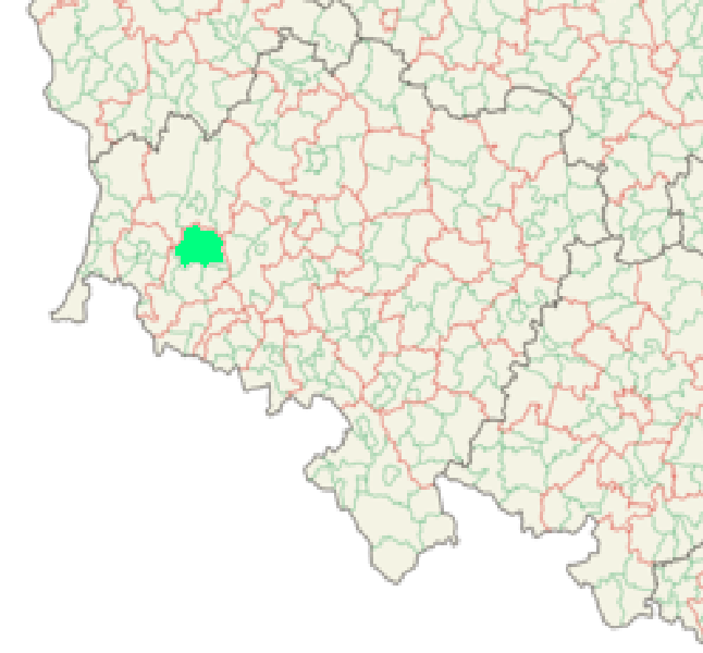 Mapa administracyjna Polski, wycinek z zaznaczeniem gminy Lwówek Śląski.